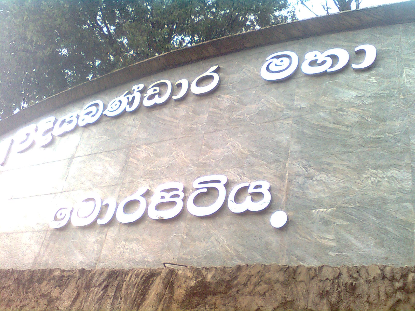 සිංහල: පාරට පෙනෙන